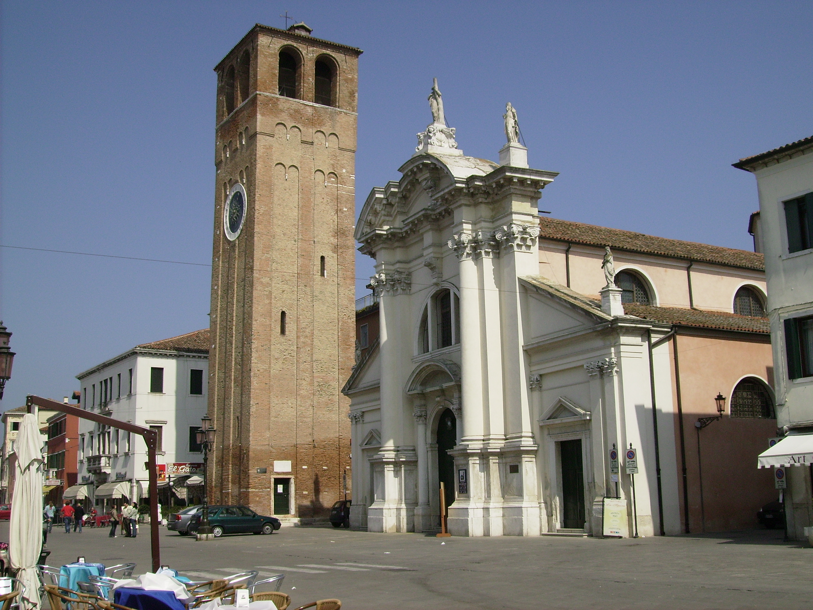 AV - S.ANDREA-CHIOGGIA (VE)